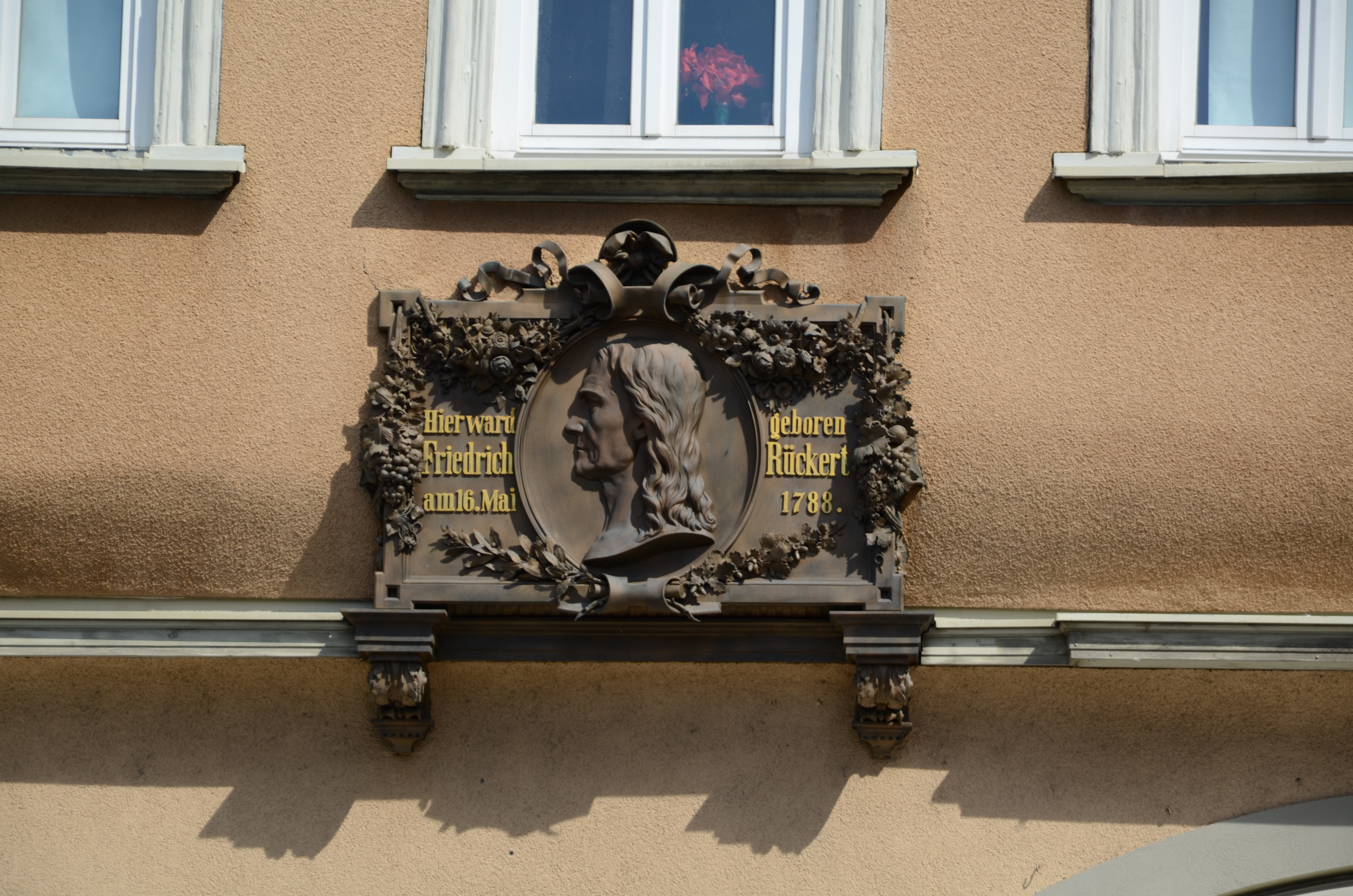 Schweinfurt Markt 2, Geburtshaus Friedrich Rückerts